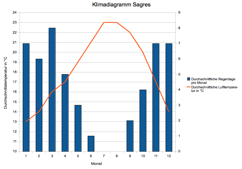 Klimadiagramm von Sagres, Portugal